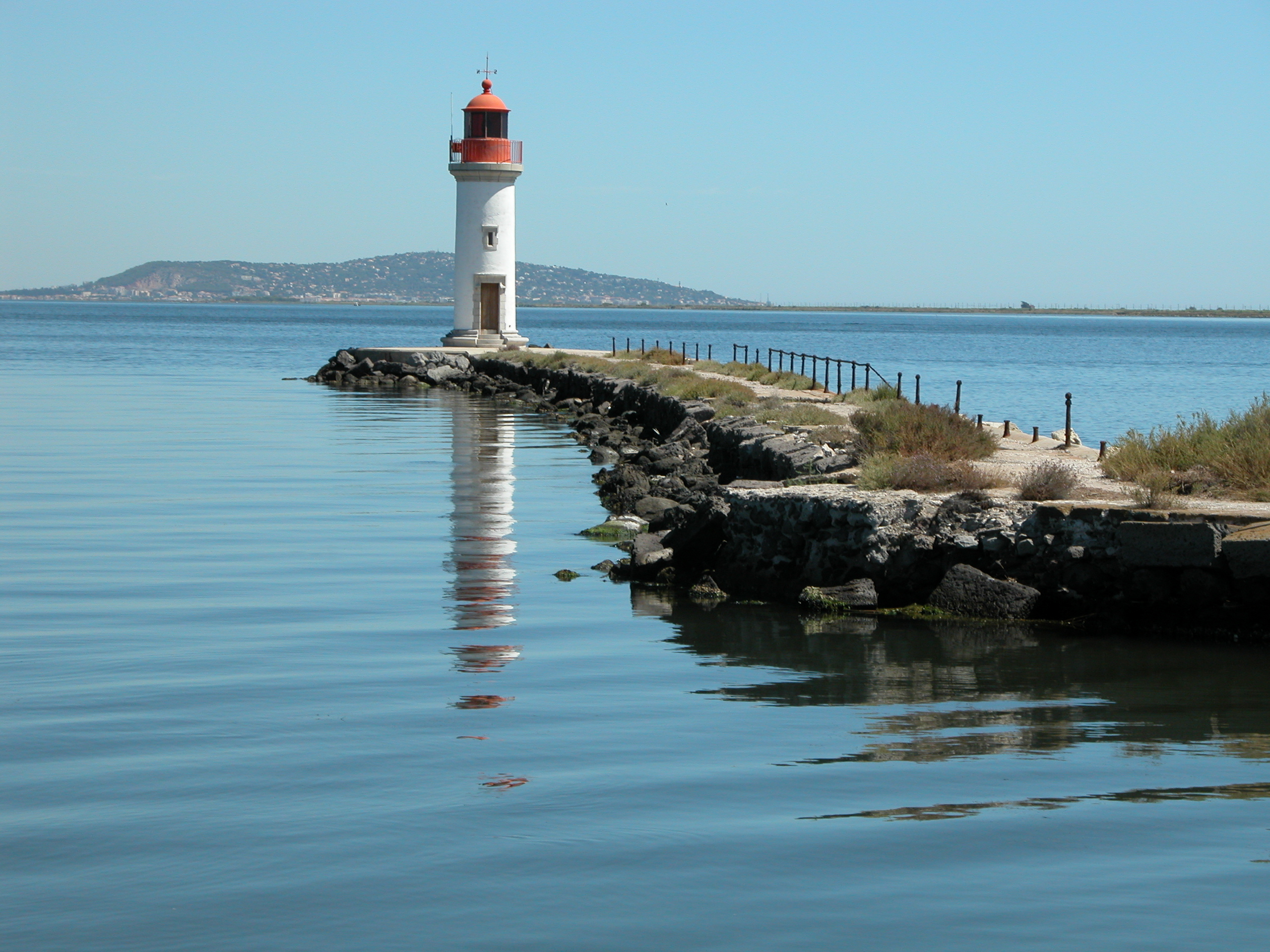 Le Canal du Midi rejoint l'Étang de Thau à Marseillan. Sète à l'horizon.